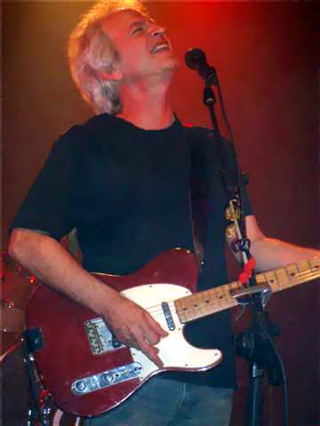 Shalom Hanoch live, 2007